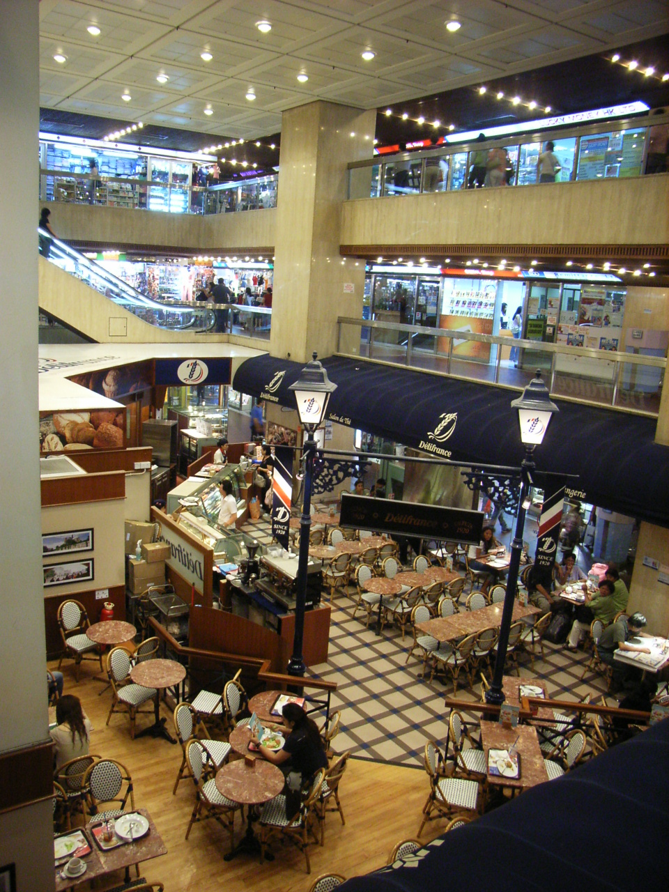 Hong Kong, 環球大廈 (World-Wide House)位於香港中環zh:德輔道中, 其內商場最大的租戶是一家法式麵包餐廳